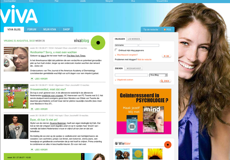 Screenshot nieuwe Viva site in blogvorm